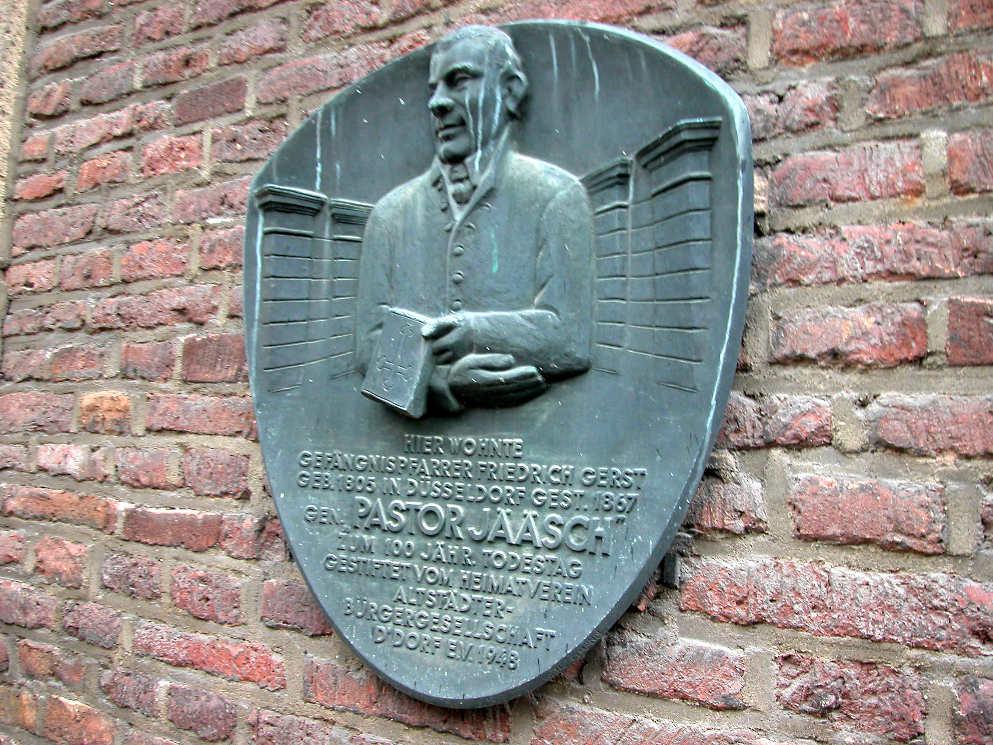 St. Maximilian in Düsseldorf, Deutschland